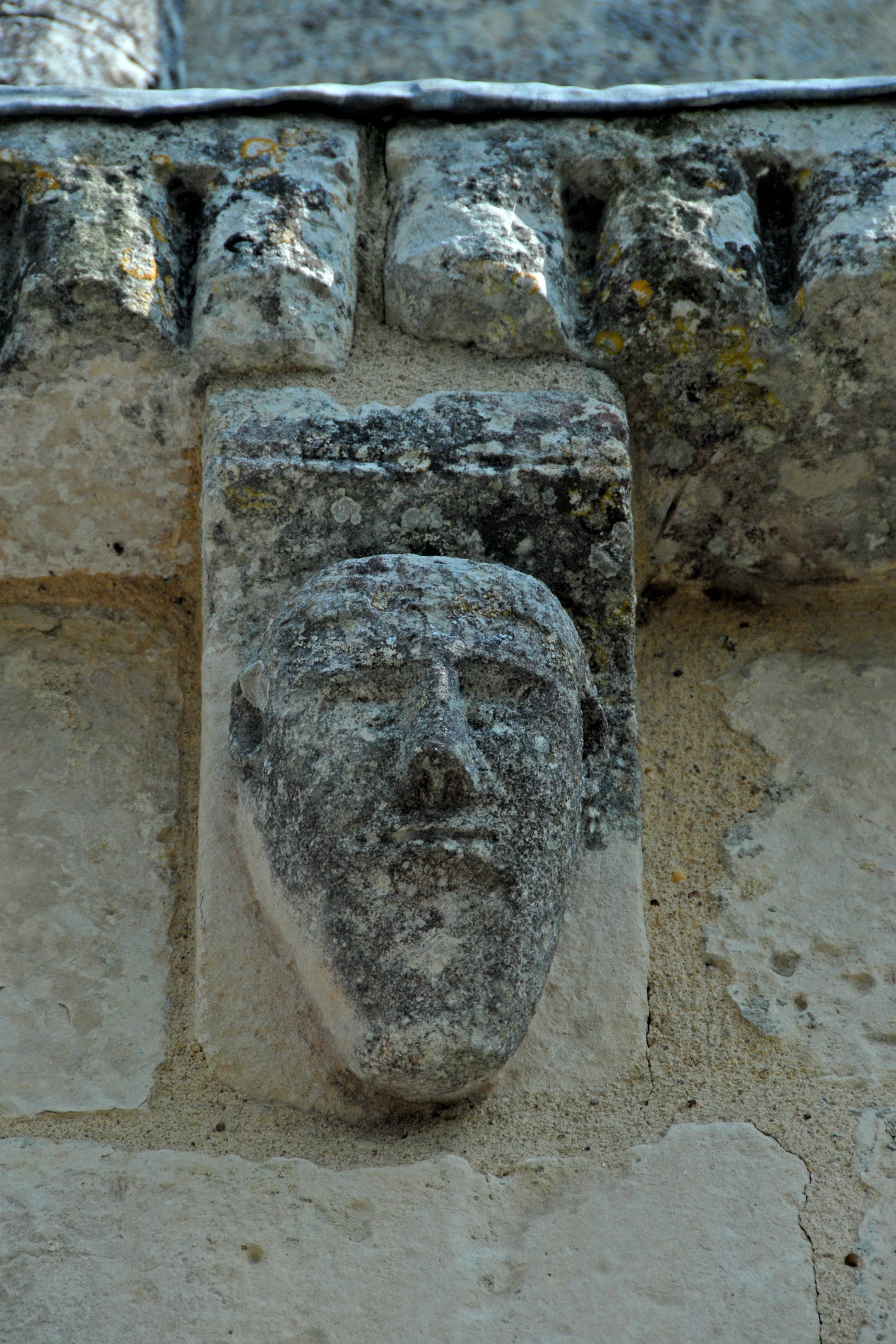 Avy, Kragsteinskulptur uber dem Erdgeschoss